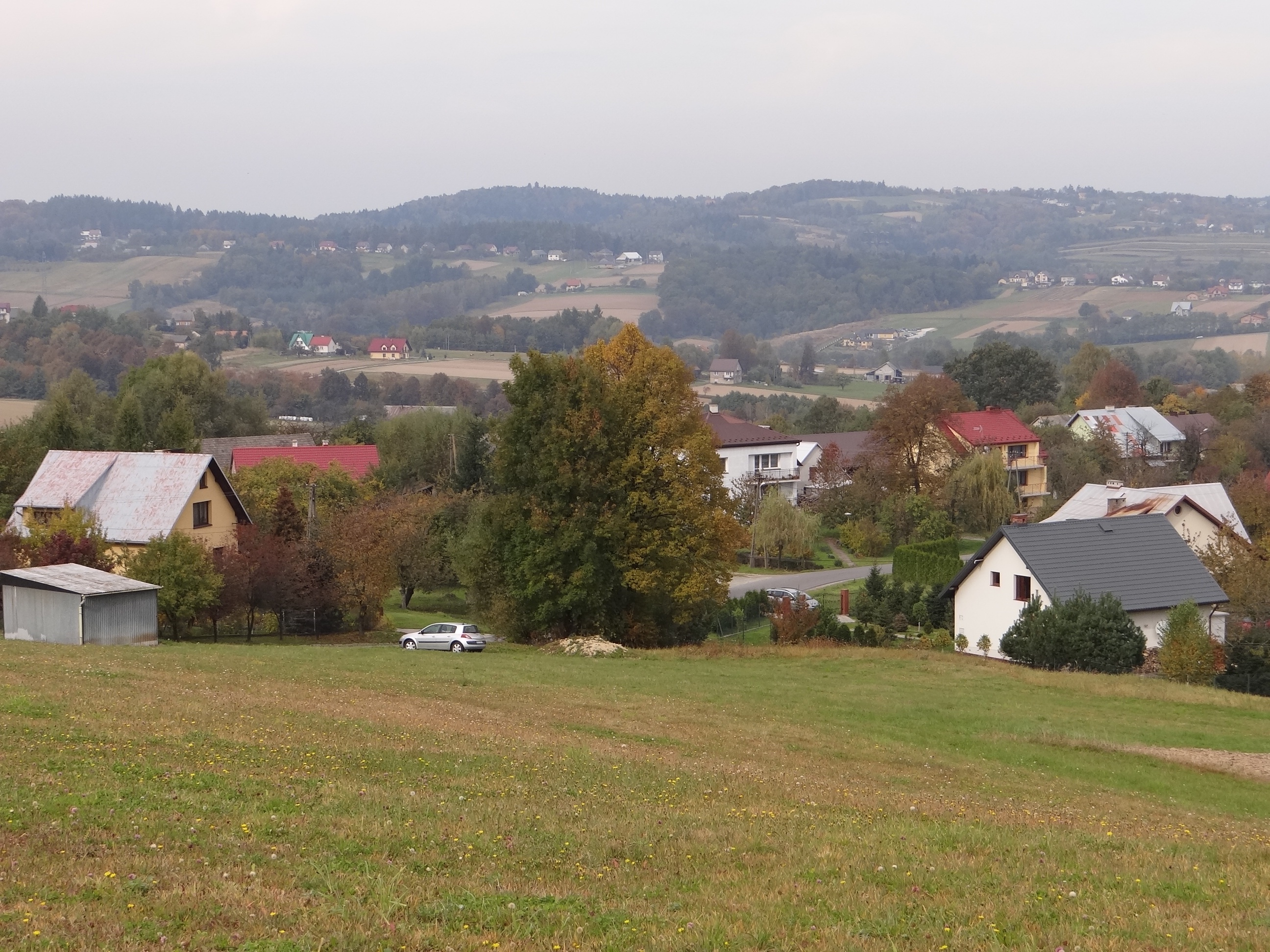 Fragment miejscowości Wola Nieszkowska i inne przyległe miejscowości